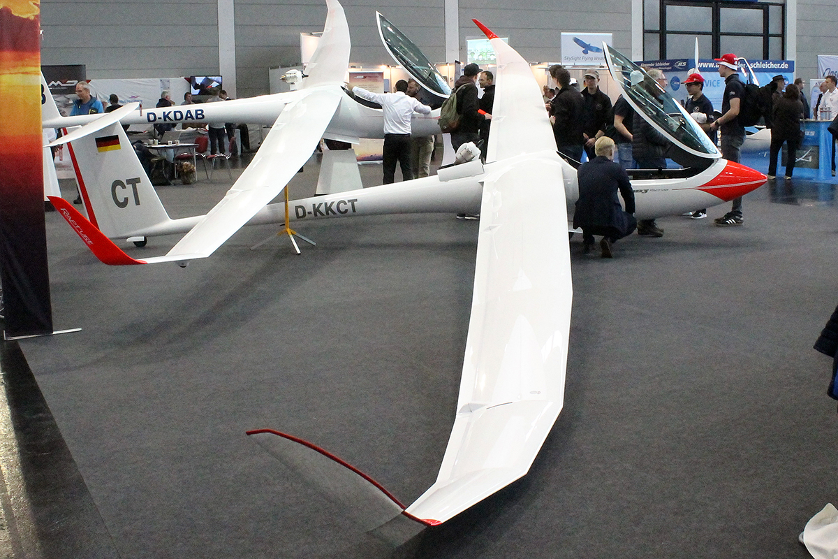 D-KKCT M & D Flugzeugbau JS-MD3 Rapture @ Friedrichshafen 10/04/2019